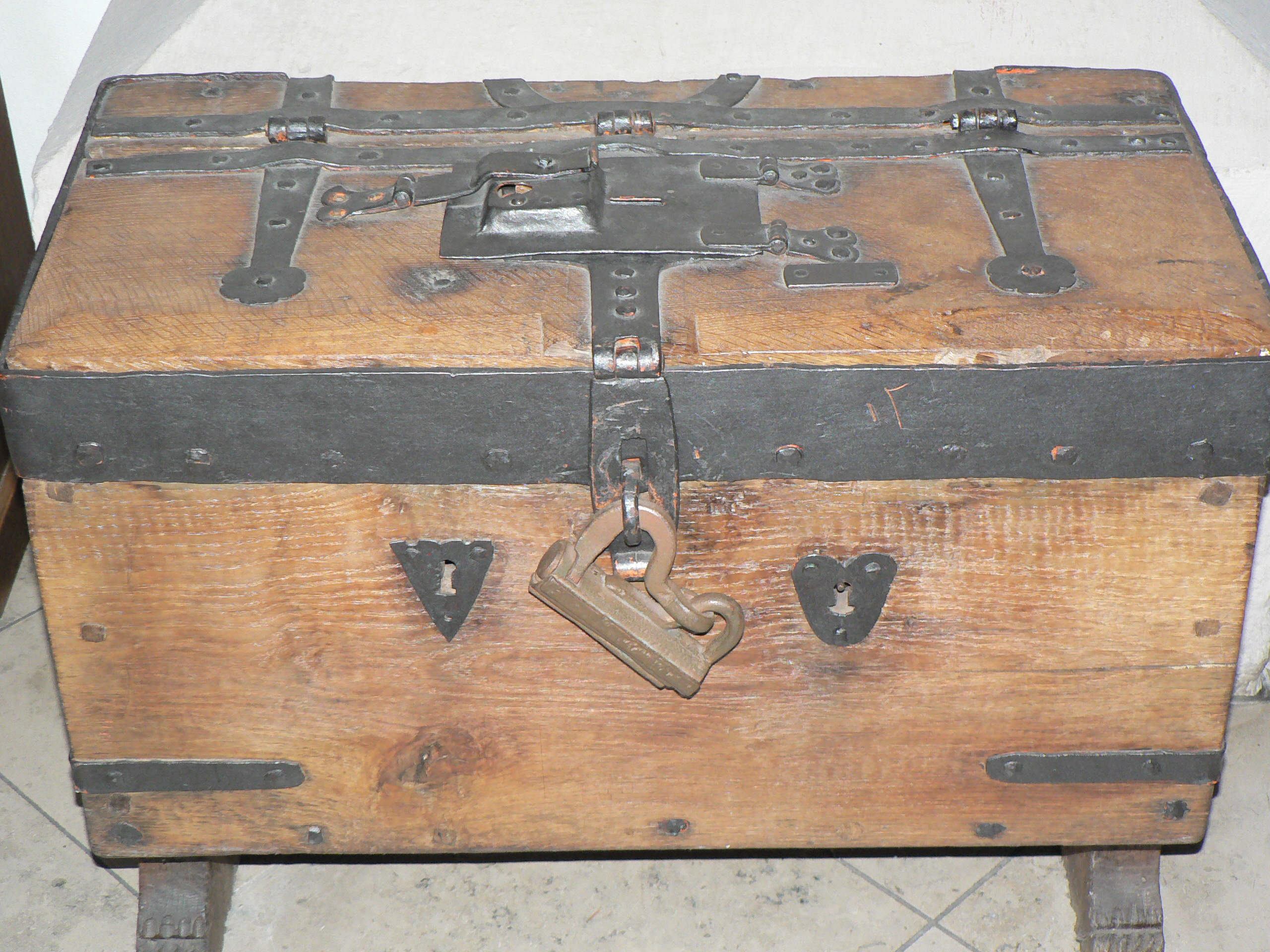 eigene Datei